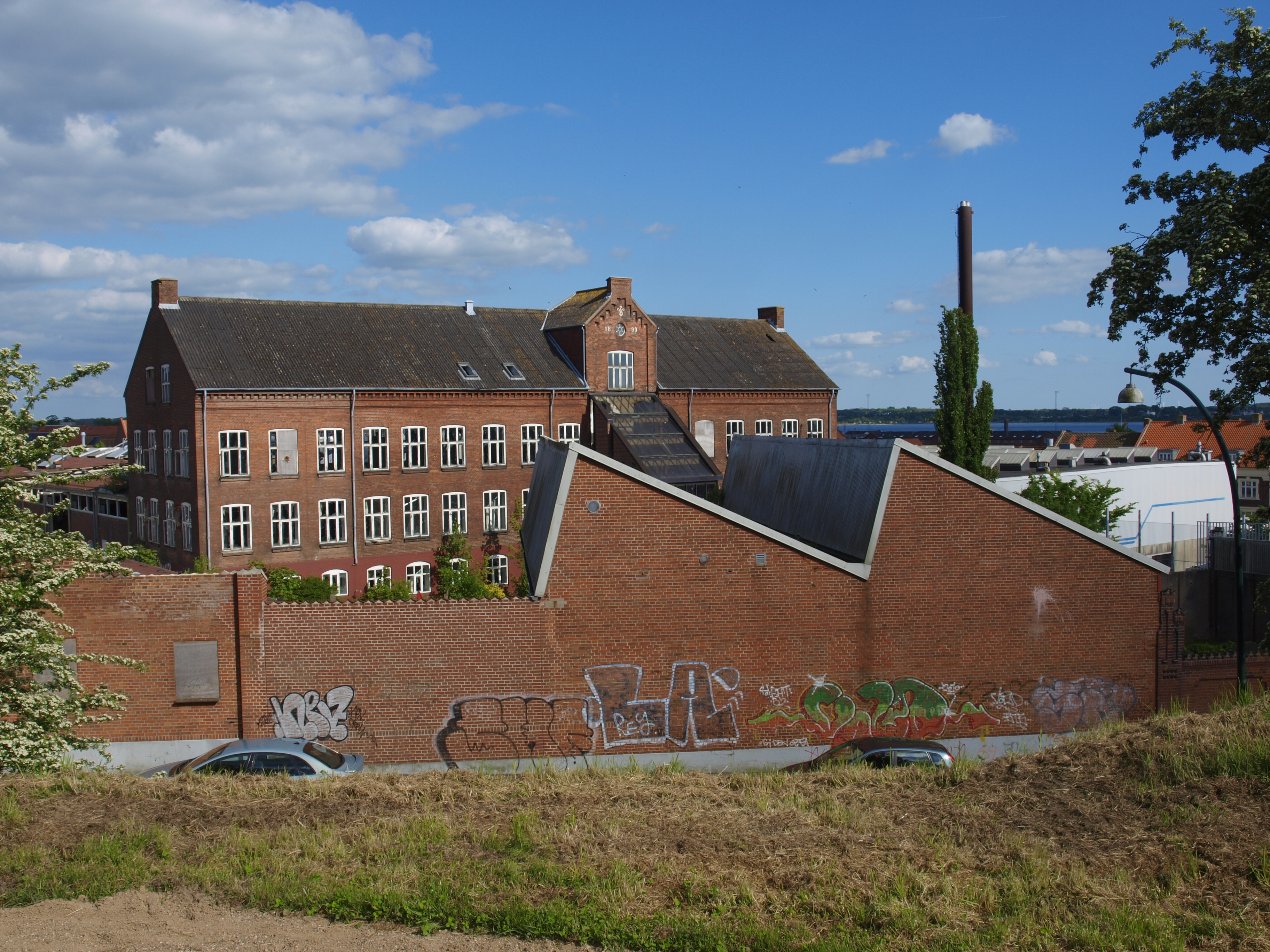 Voss tidligere bygninger i Fredericia, 4. juni 2015, set fra Fredericias Volde